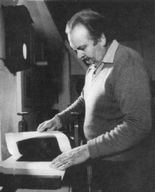 Albino Fernandez en su taller